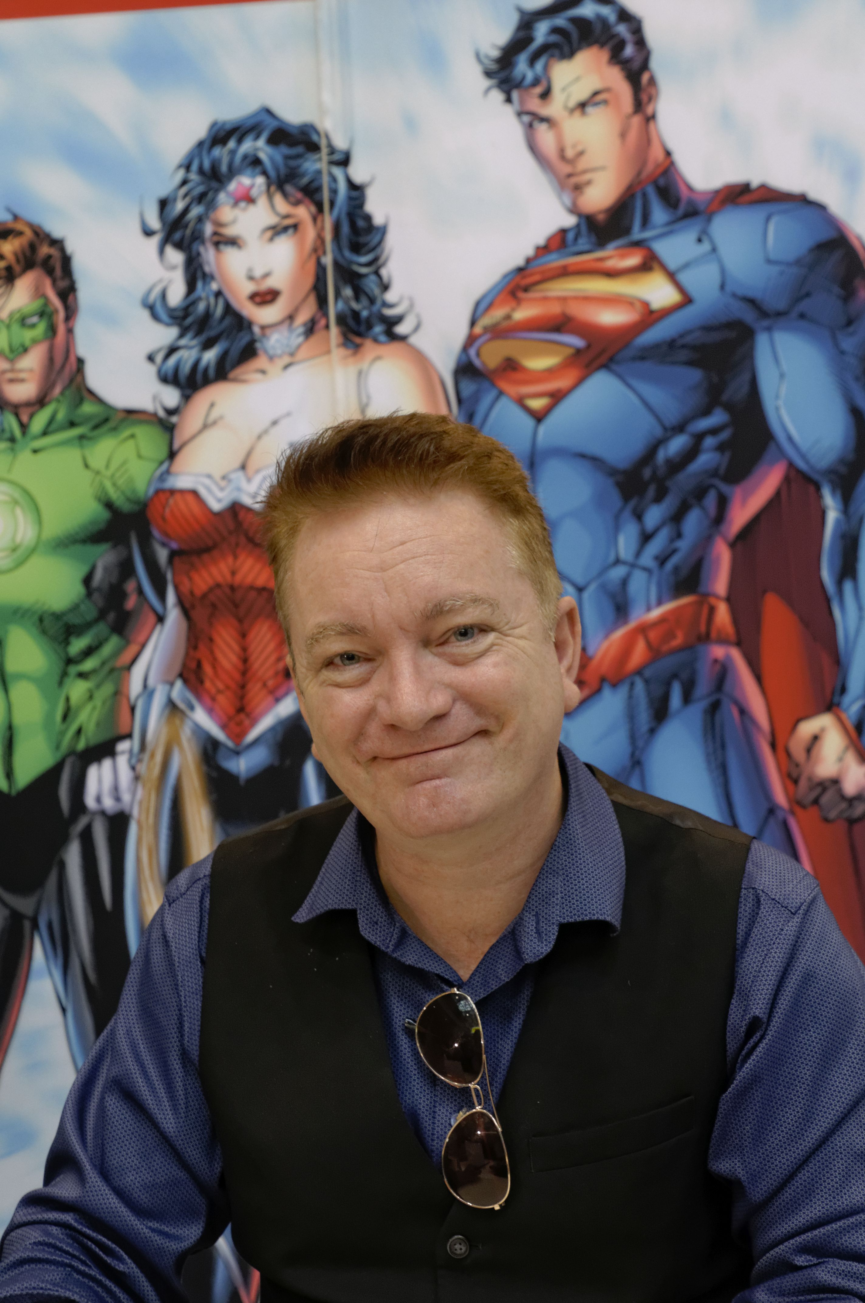 Bilder von der Comic Con Germany 2019 in Stuttgart